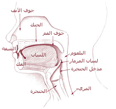 أجواف الرأس والعنق